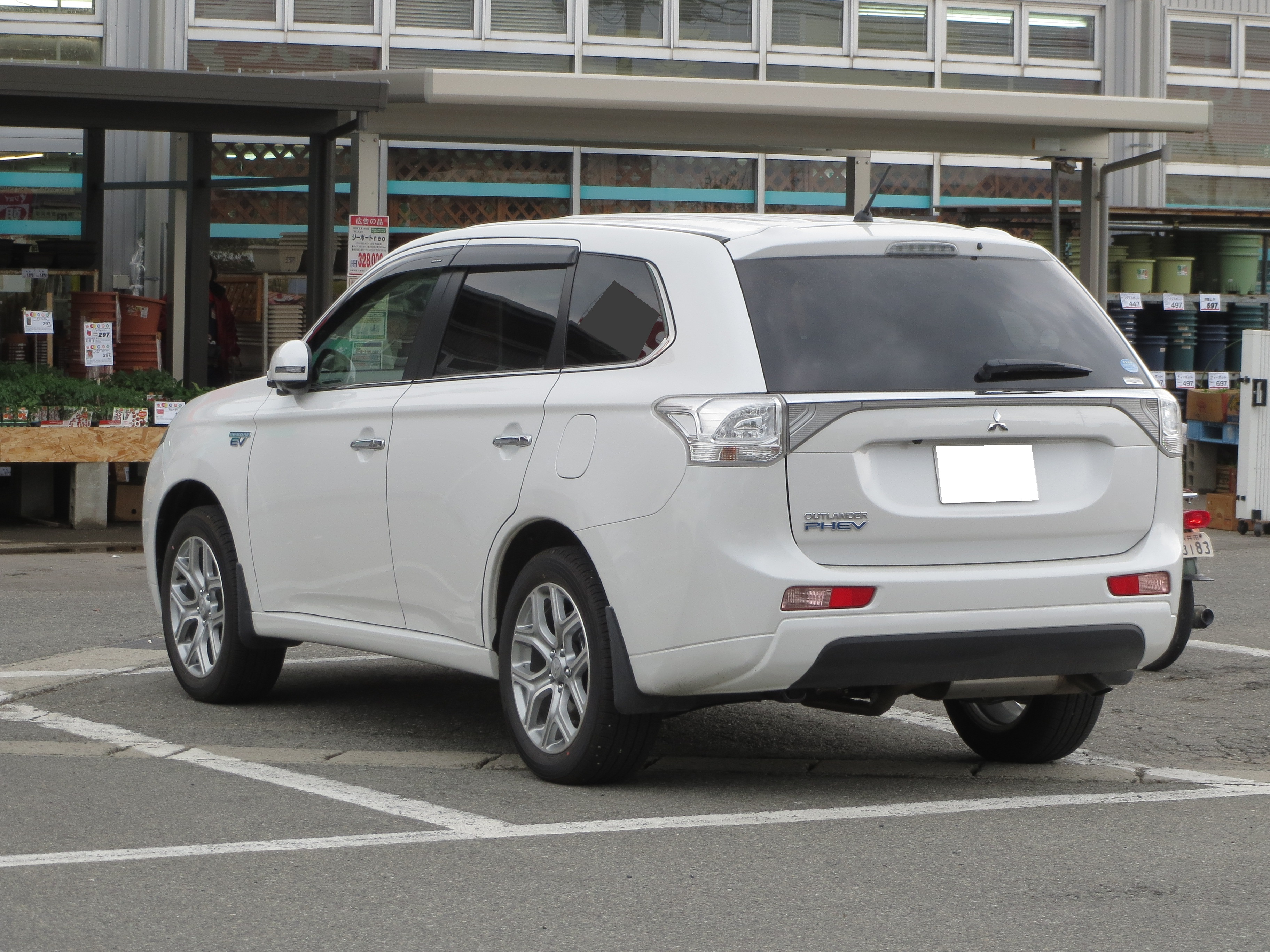 三菱アウトランダーPHEV